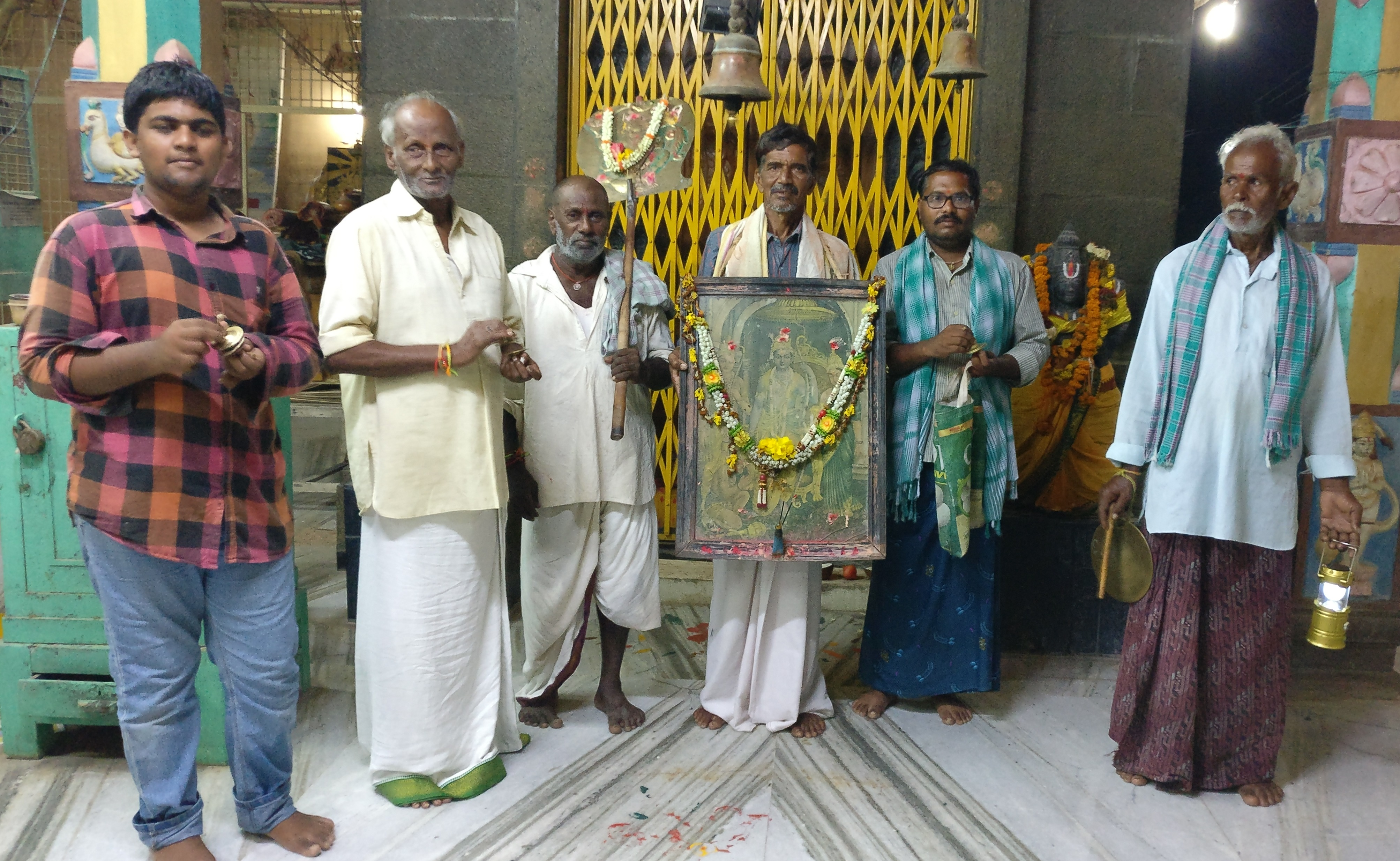 శ్రీ సీతారామాంజనేయ భజన భక్త సమాజ బృందం 1950సంవత్సరంలో గ్రామ ప్రధాన వీధులలో తెల్లవారుజామున తిరుగుతూ “శ్రీరామ నామస్మరణ”తోనే గ్రామంలో తెల్లవారే లాగా రాములోరి పరమ పవిత్ర భక్తుడు గుంటుపల్లి కనకయ్యచే గ్రామ సంకీర్తన కార్యక్రమం ప్రారంబించబడింది. ఈవిధంగా నిర్వహించడం ఈదేవస్థానం యొక్క ఆనవాయితీ. అవిచ్ఛన్నముగా భక్తులచేత కొనసాగబడుట ఈ గ్రామమునకు గర్వకారణం.